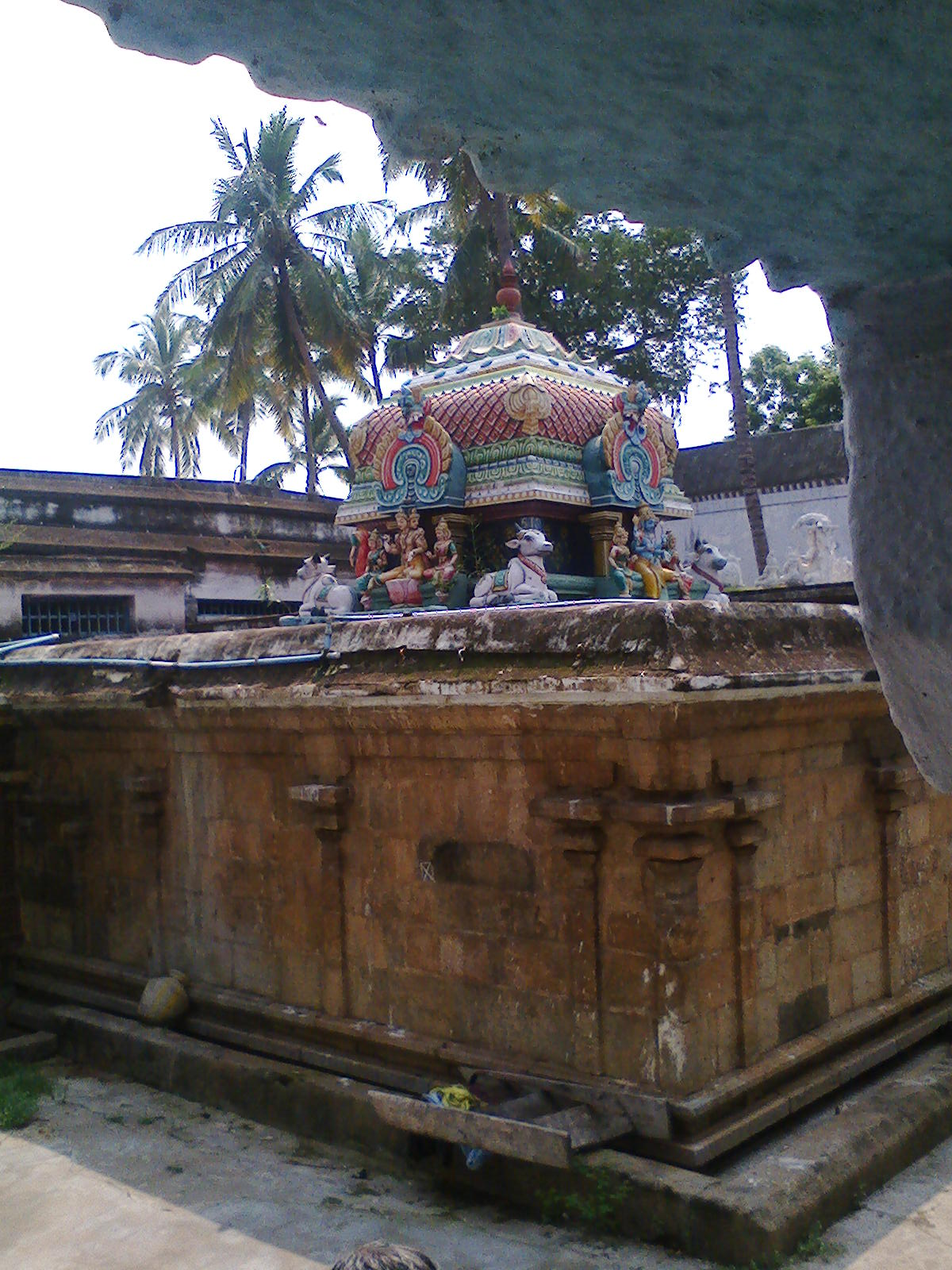 திருக்காட்டுப்பள்ளி அக்னீஸ்வரர் கோயில்